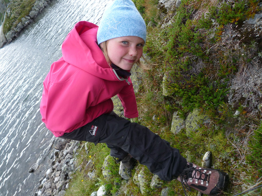 Fiskeglede i Setesdal Vesthei Ryfylkeheiane